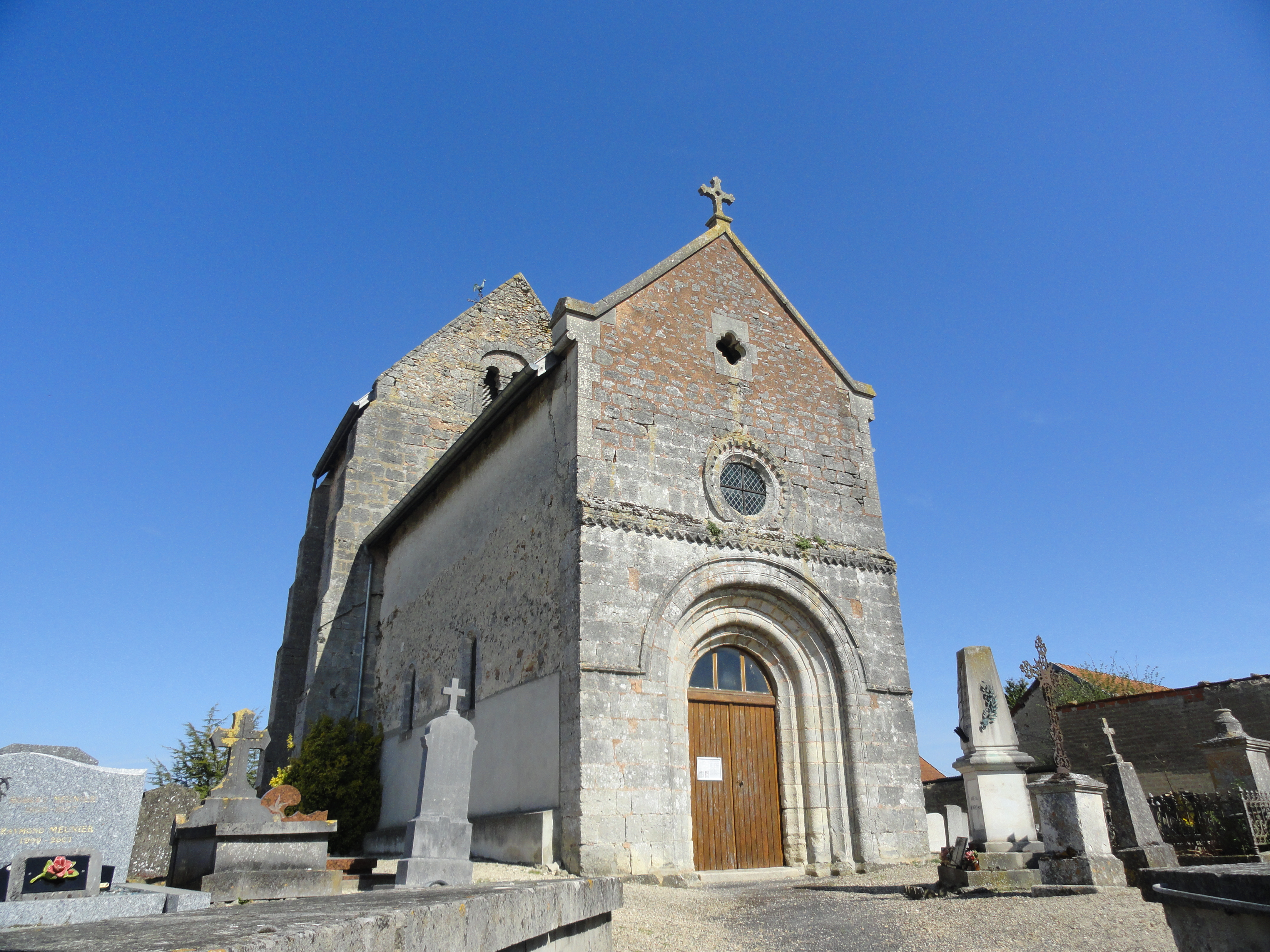 Façade (portail roman) de l'église Notre-Dame de Rouffy, entourée par son cimetière.